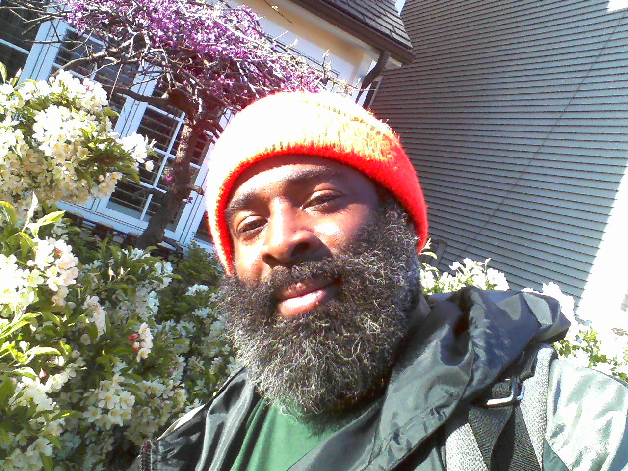 Sharkula in 2016